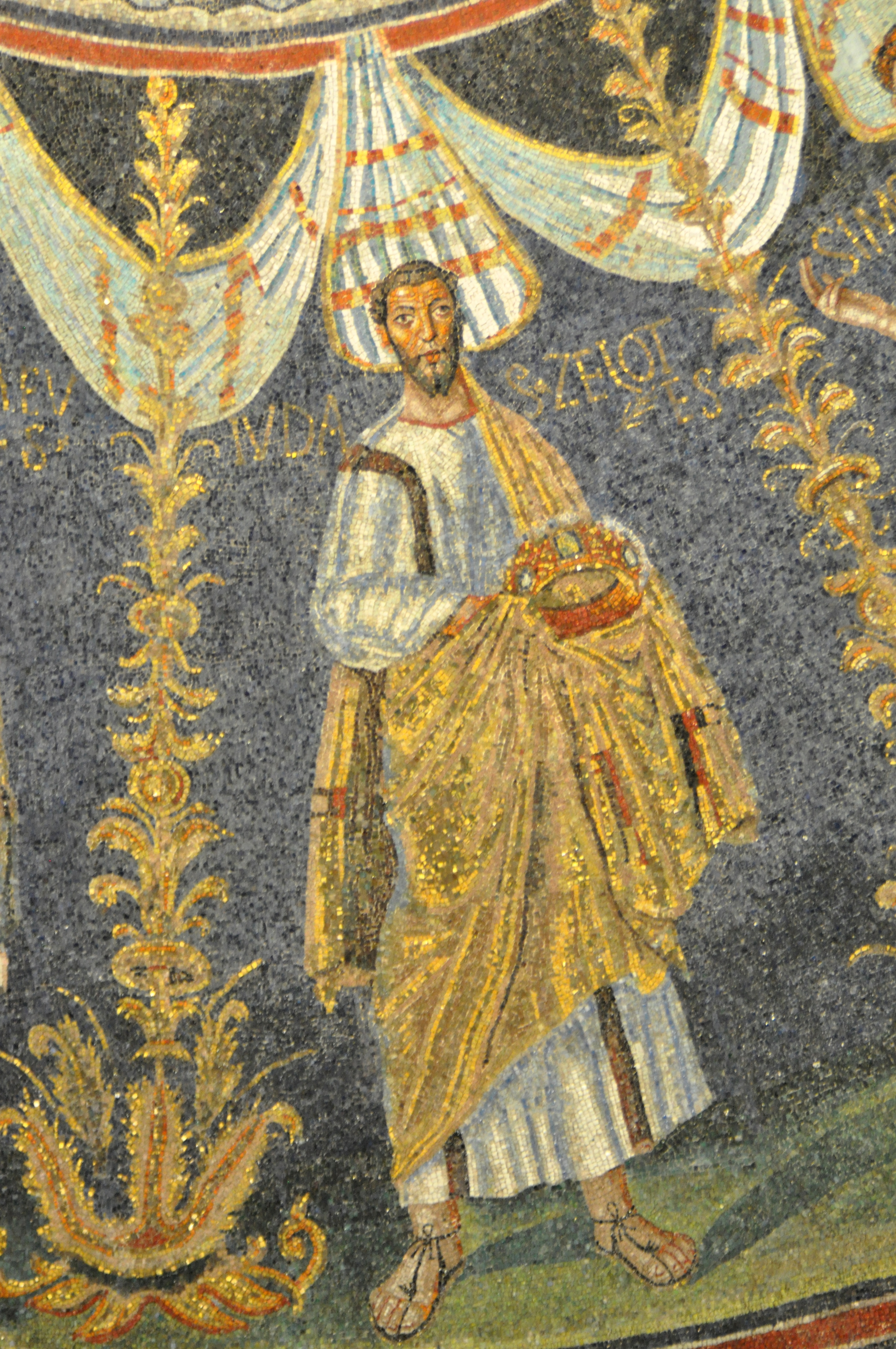 Baptisterio Neoniano en Rávena (Italia). Detalle del mosaico de la cúpula que muestra al apóstol "Judas Zelote", actualmente llamado Judas Tadeo.